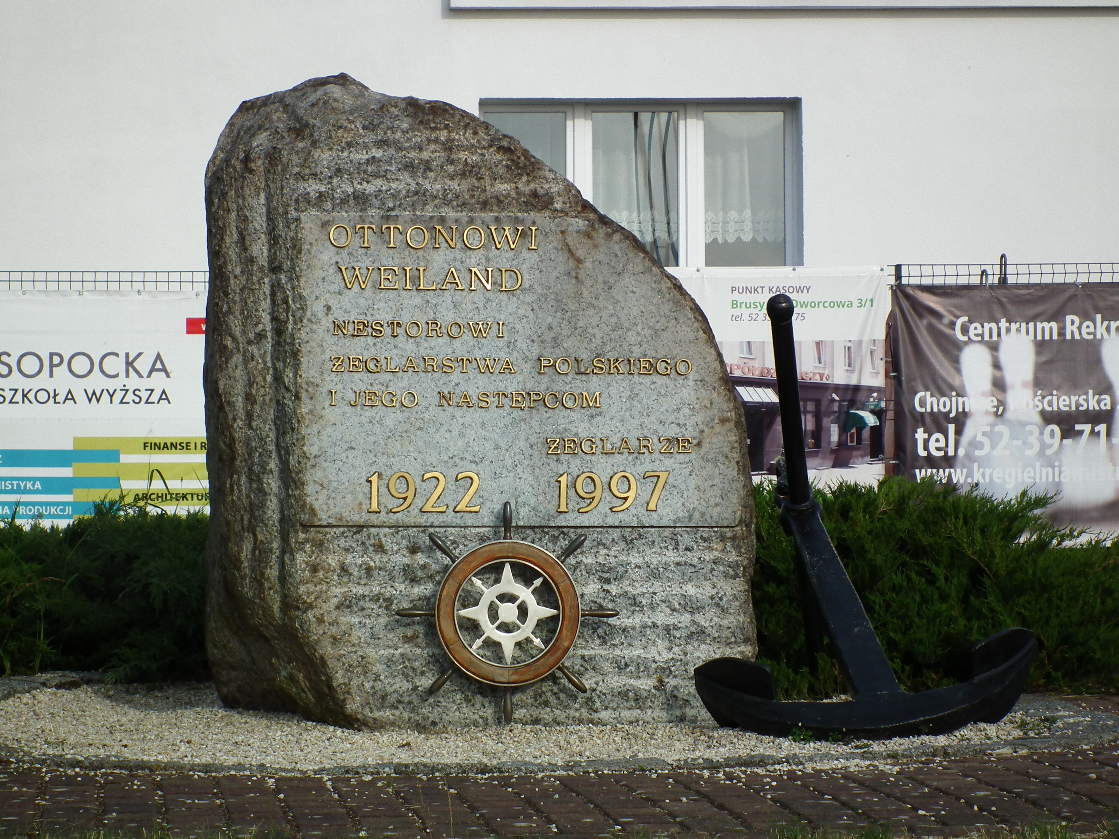 Pomnik Ottona Weilanda w Charzykowych.